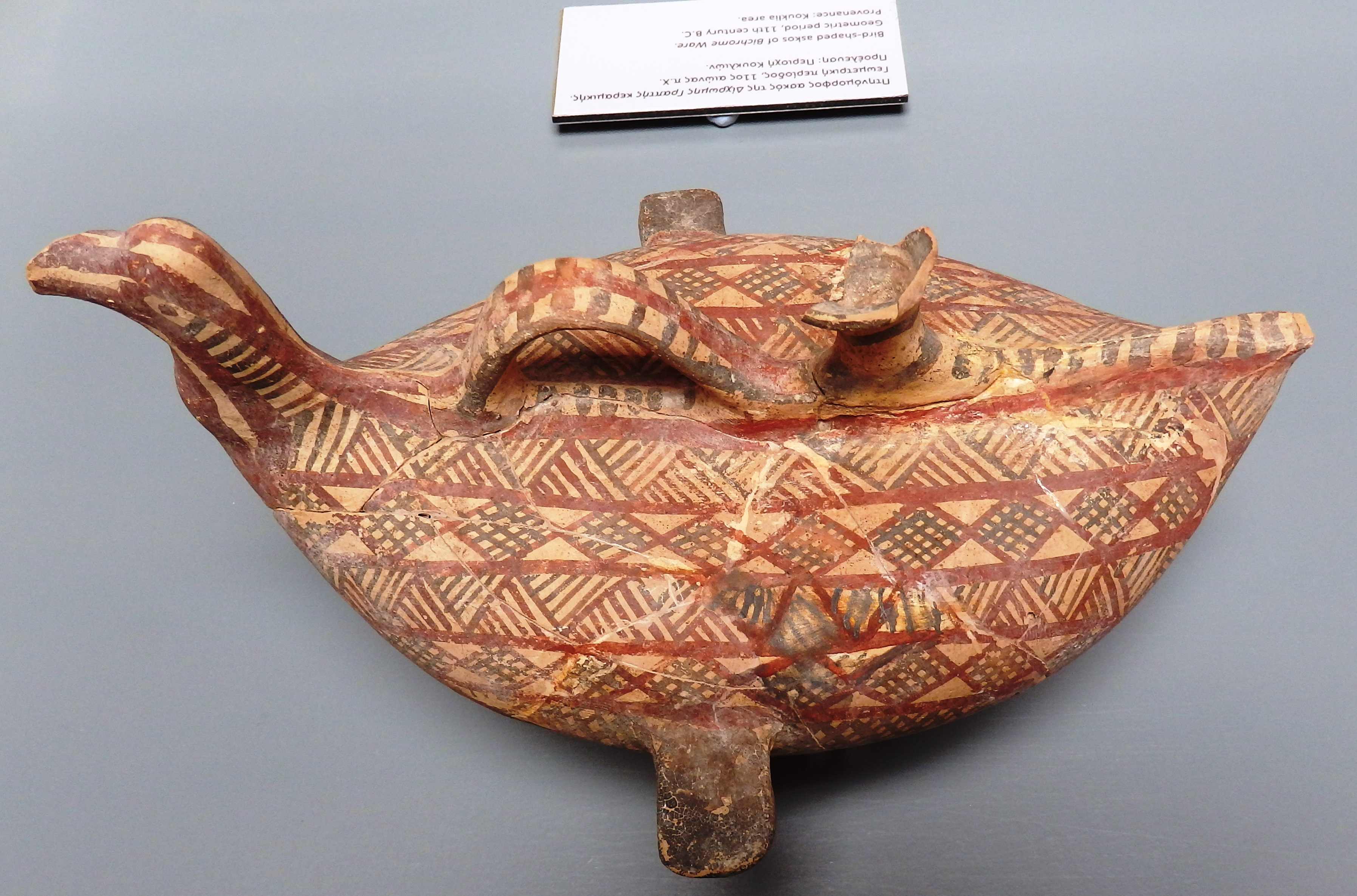 Askos im geometrischen Stil aus Kouklia, 11. Jh. v. Chr., Vogelform, Archäologiepark Pafos